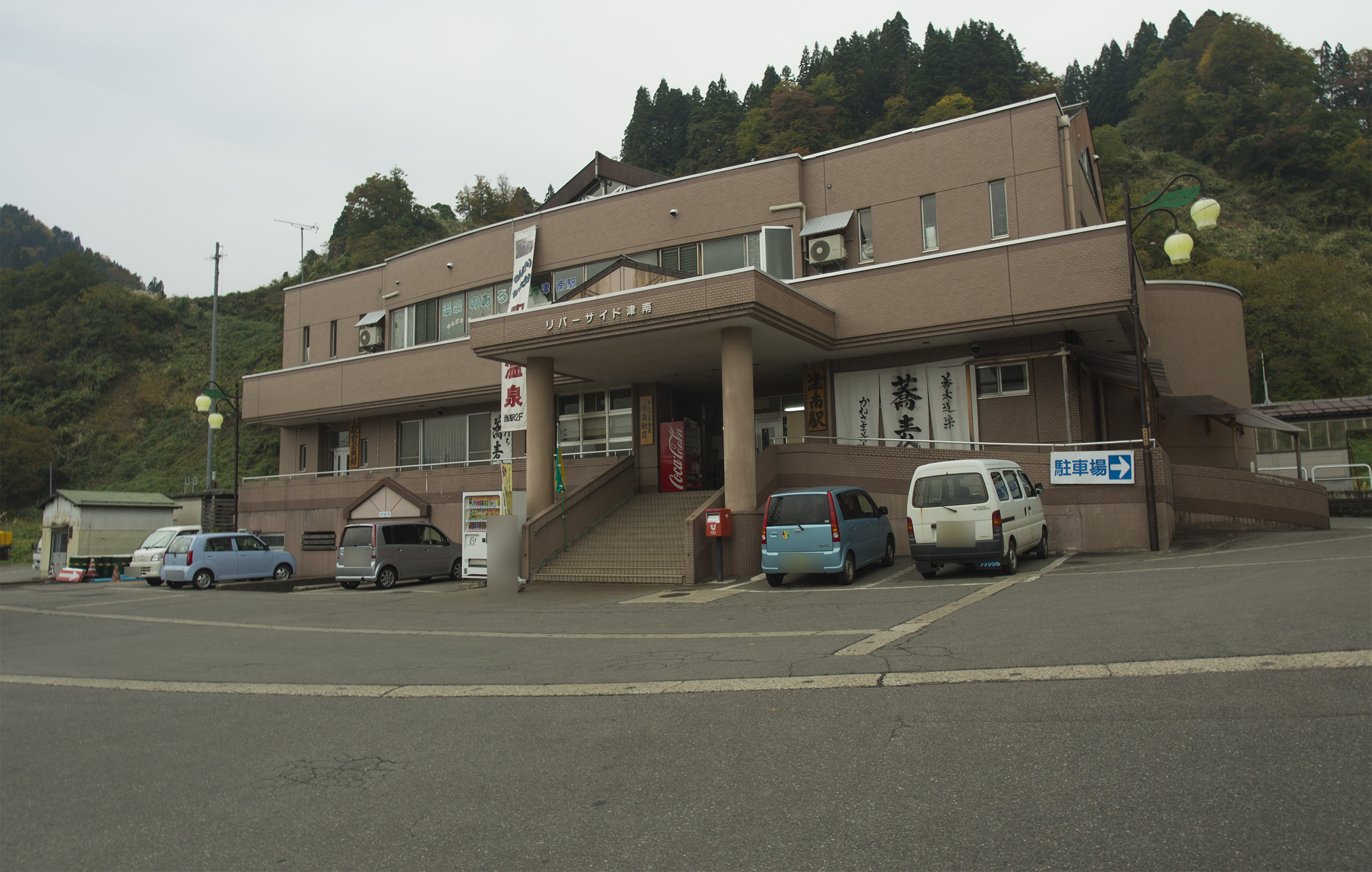 東日本旅客鉄道株式会社飯山線津南駅